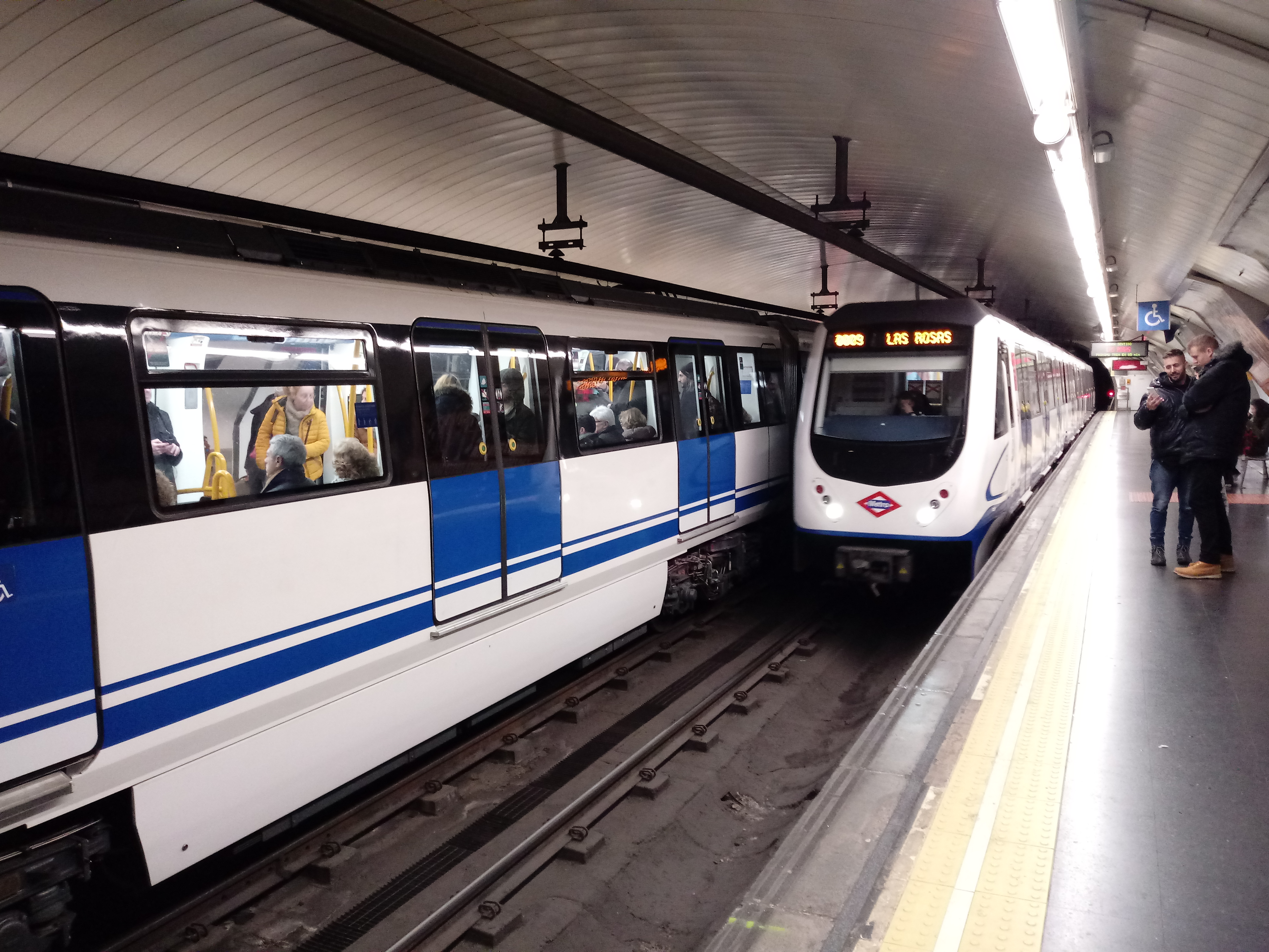 Dos trenes de la serie 3000 operando en la línea 2 de metro de Madrid se cruzan en la estación de Santo Domingo.